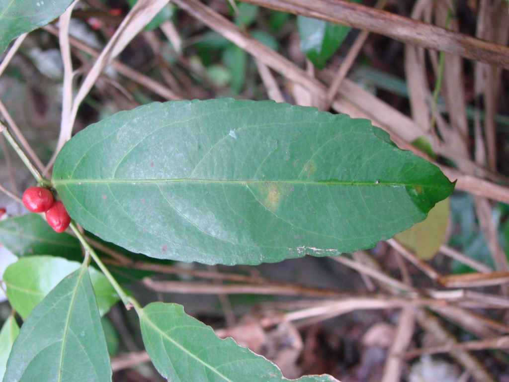 Maytenus robusta Reissek - CELASTRACEAE - Área de Relevante Interesse Ecológico do Riacho Fundo - Brasília - Distrito Federal - Brasil.